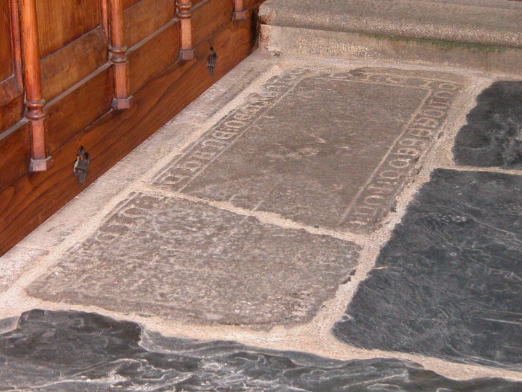 Chapelle Notre-Dame de Châteaulin. La tombe de Jothane de Trésiguidy(1324).